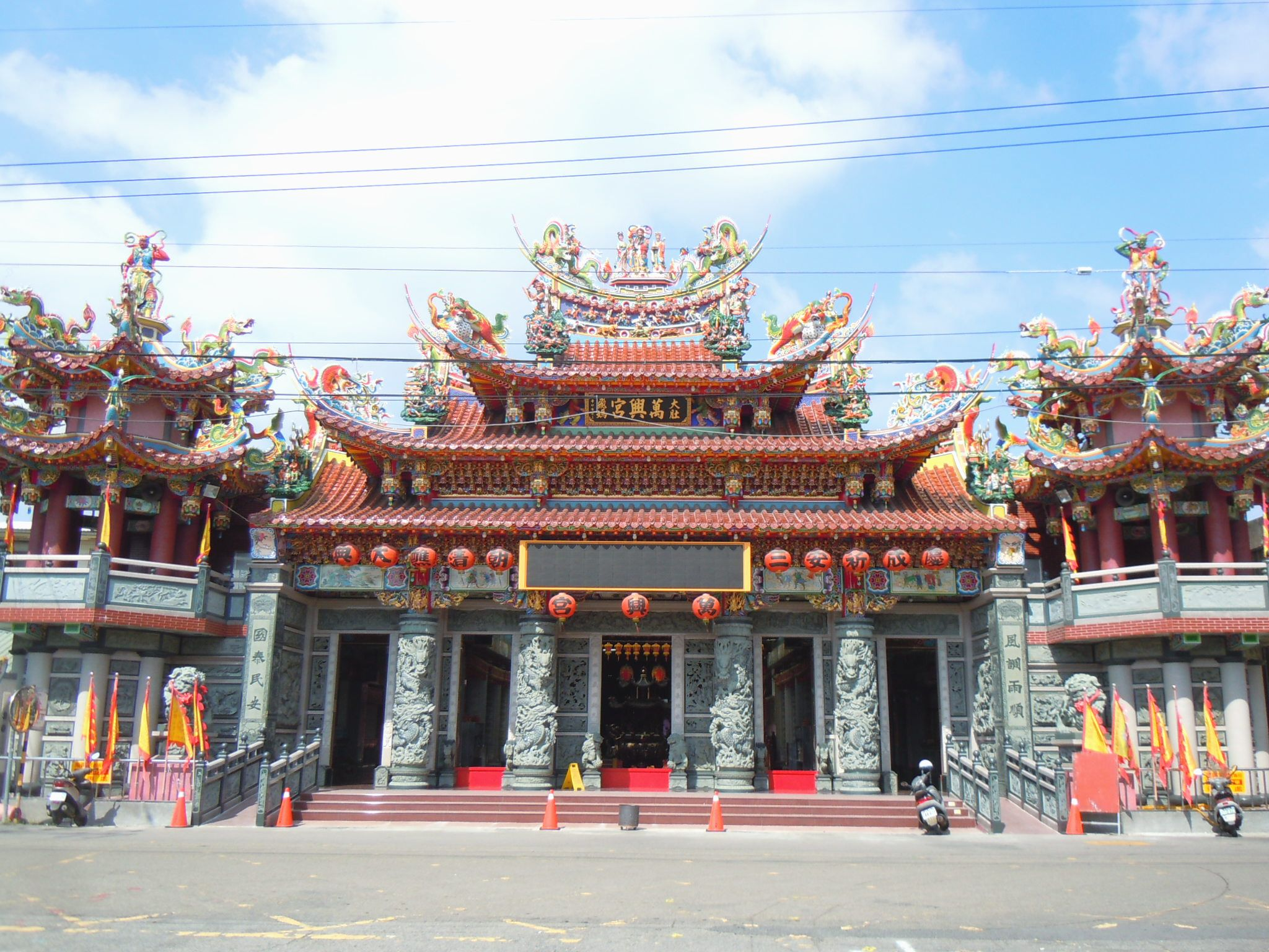 大肚萬興宮位在臺中市大肚區頂街里榮華街154號。